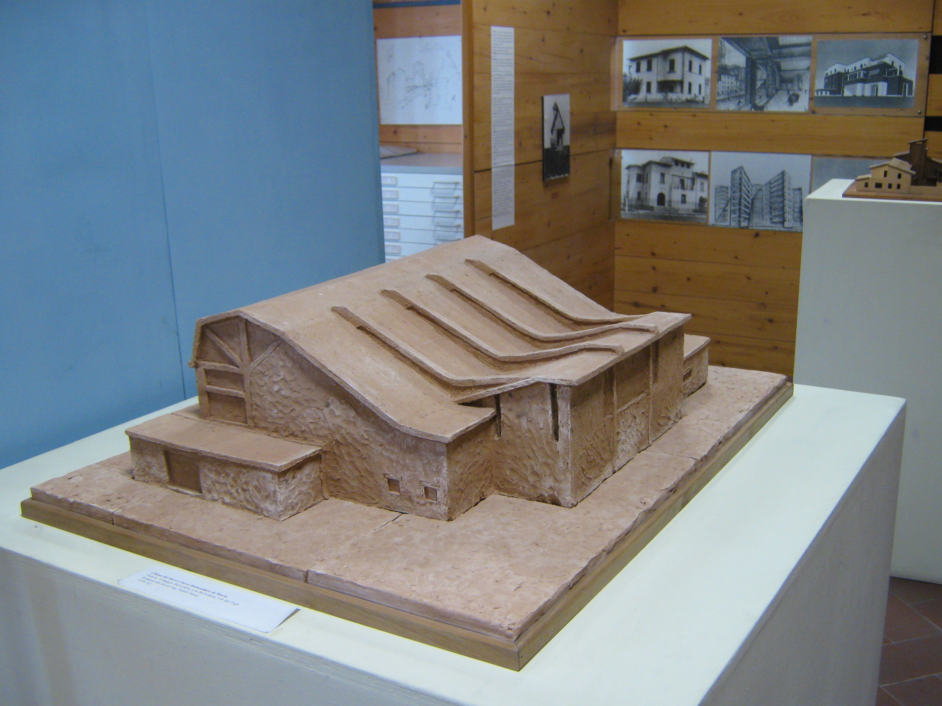 Pistoia, Museo Civico (Palazzo del Comune): modello della chiesa del villaggio Belvedere, in Pistoia.